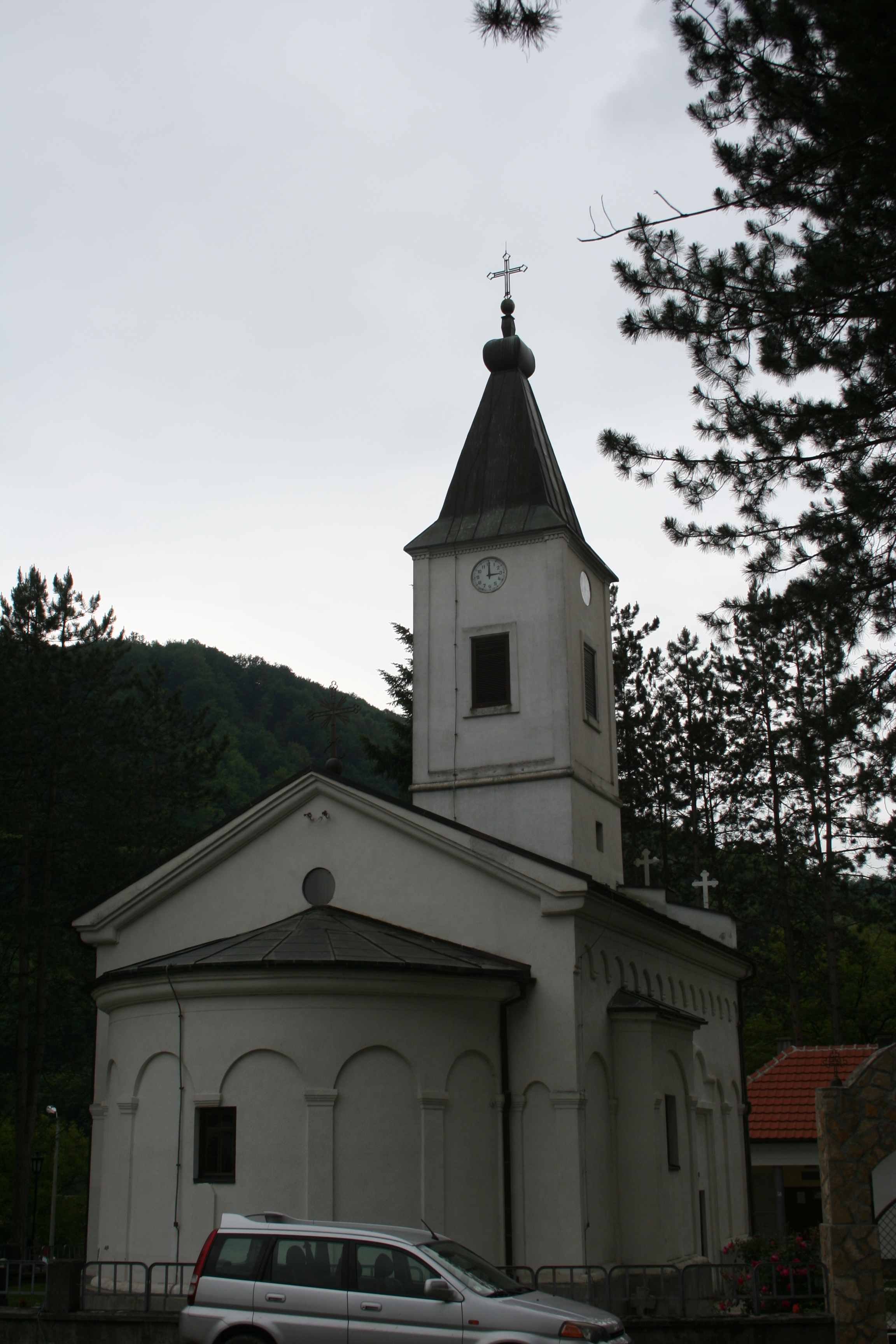 Crkva Vaznesenja Hristovog, Rogačica